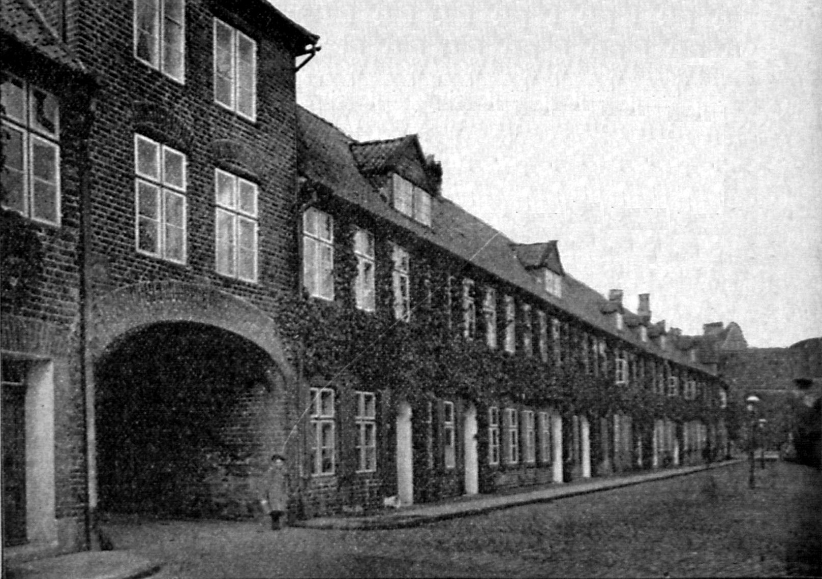 Einblick in den ersten Hofraum des St. Johannisklosters. (niedergelegt 1903)